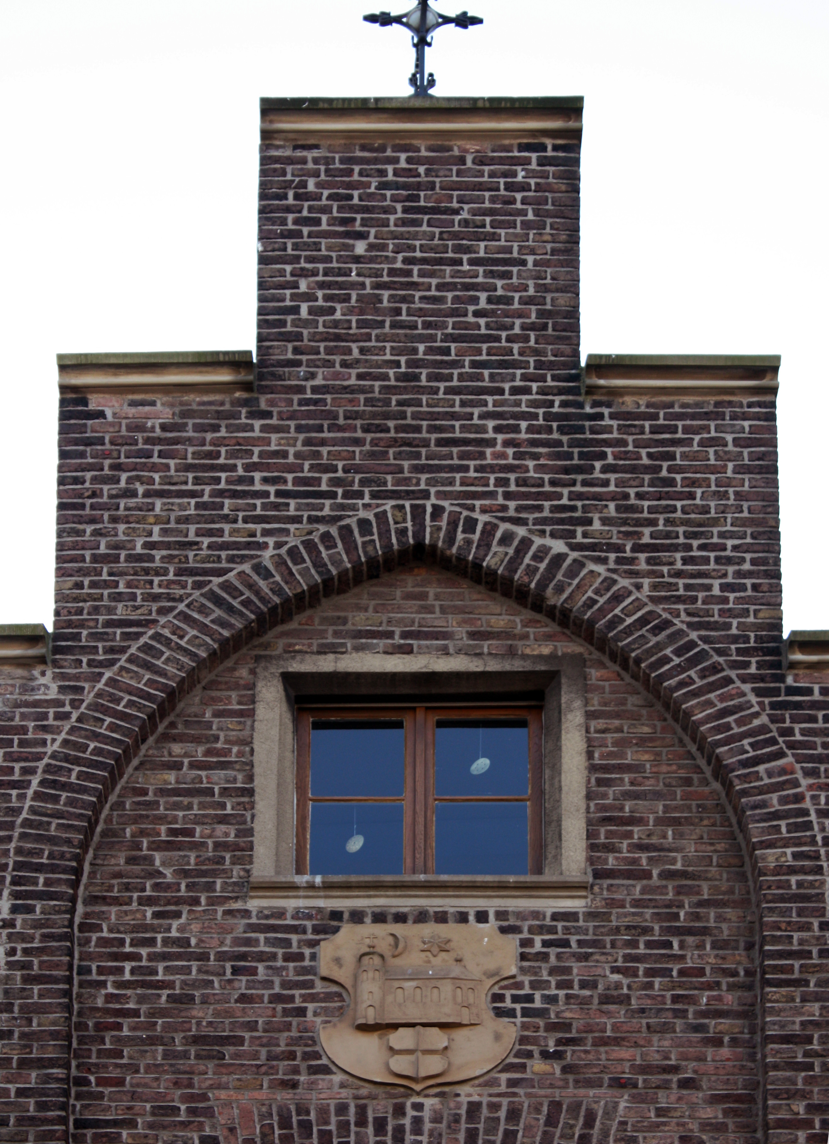 Lechenich, Stadtdetail